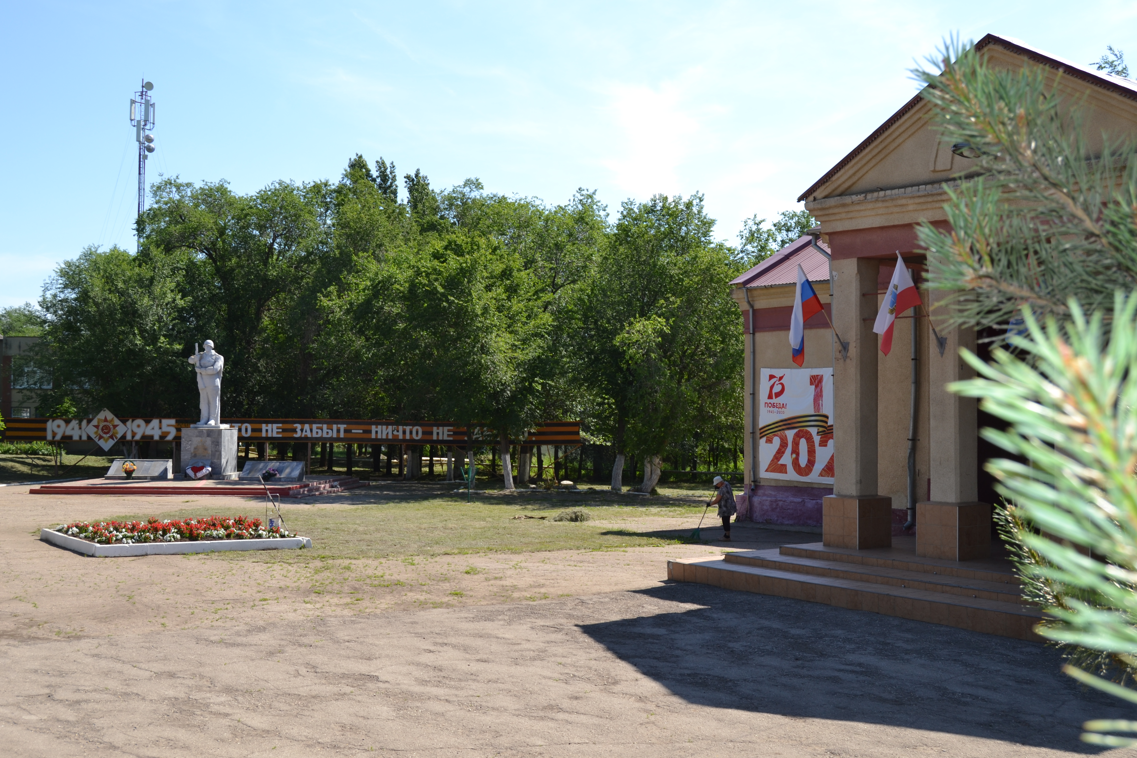 Изображение населённого пункта. Площадь (Дубки, Саратовский район)